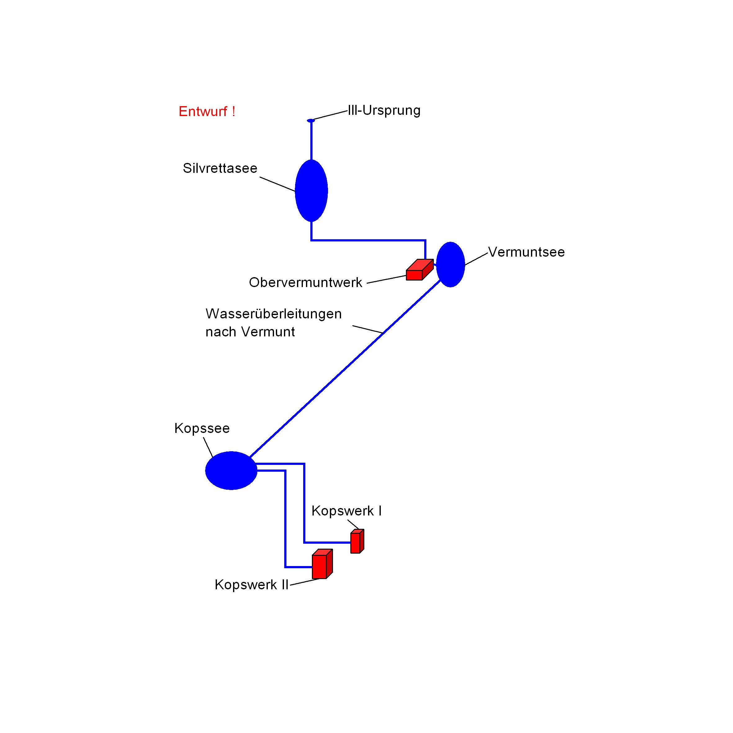 Schematisierte Darstellung der Kraftwerkskette der Illwerke AG in Vorarlberg, Österreich